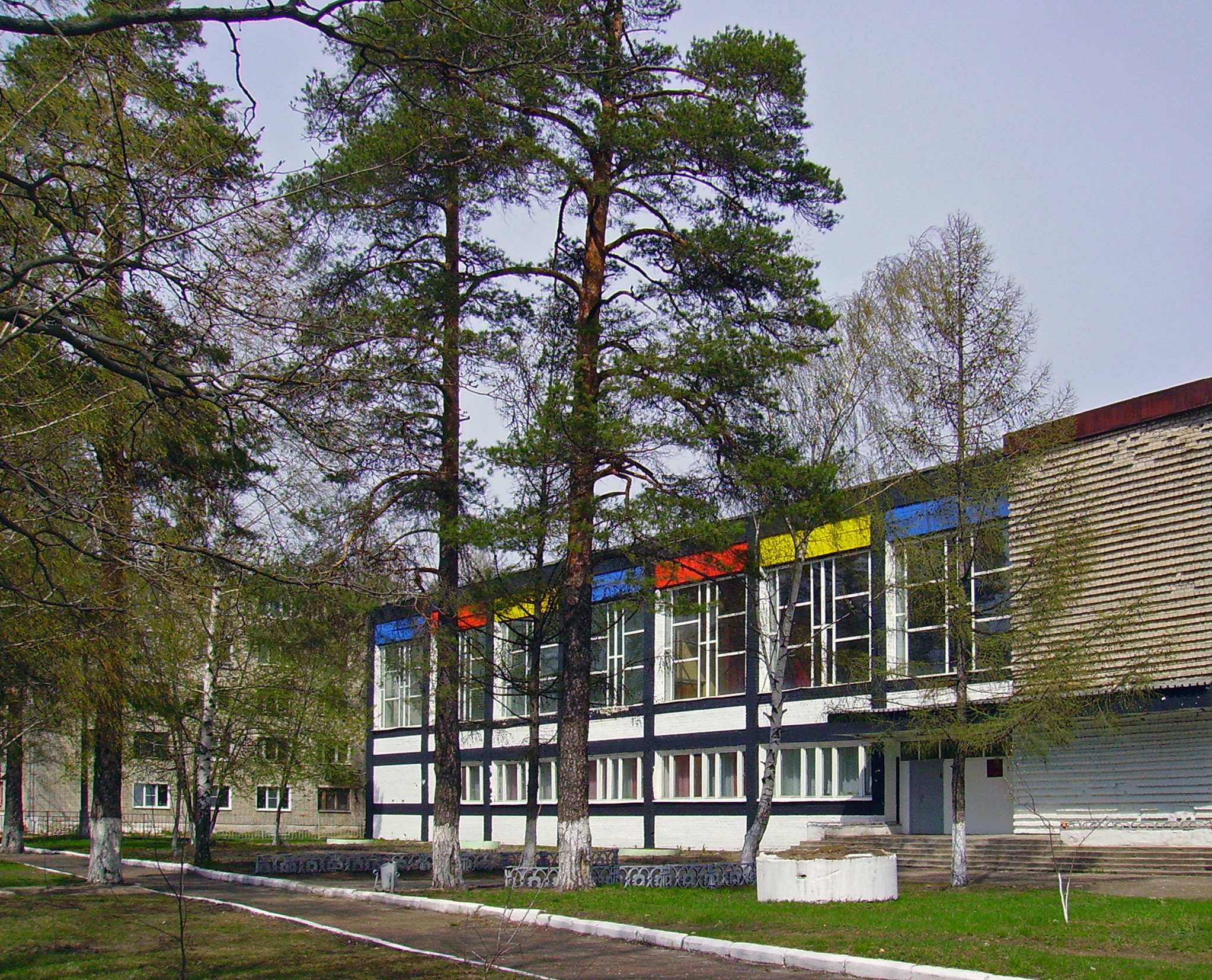 Выкса. Политехнический колледж.